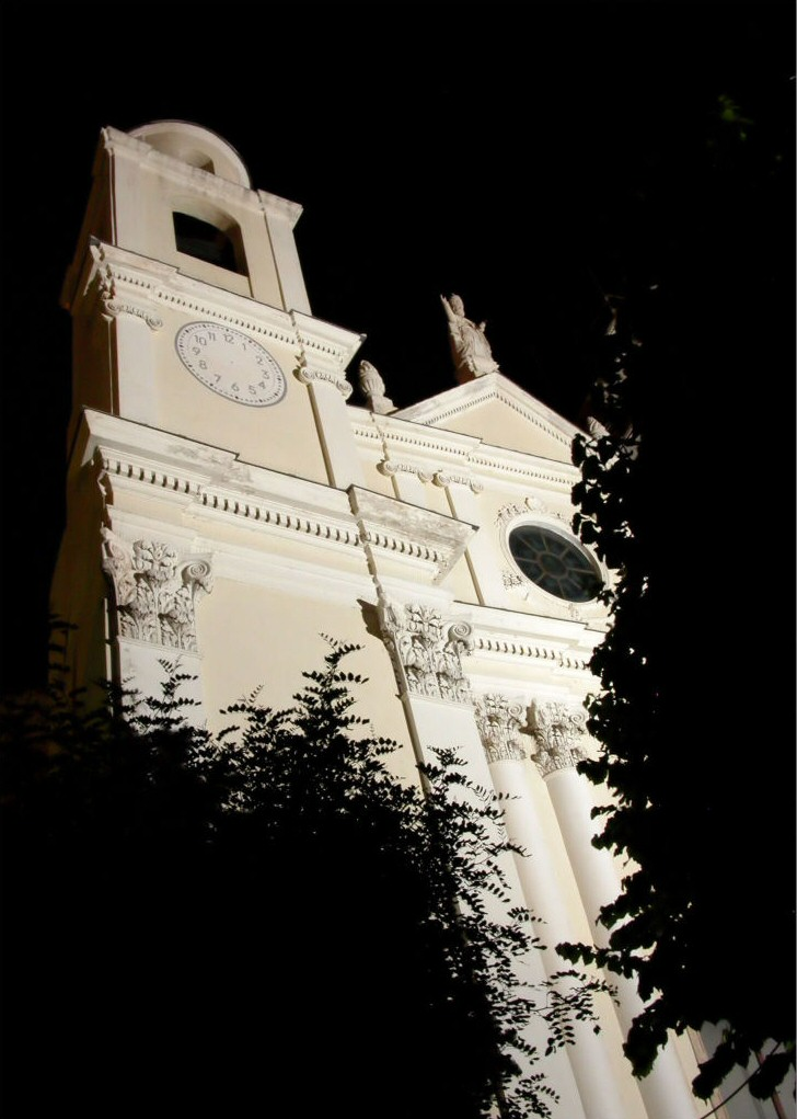 Chiesa di San Pietro, Borgio. Foto scattata da Stefano Trezzi (Utente:Yoruno) e da me licenziata secondo la licenza sotto indicata.